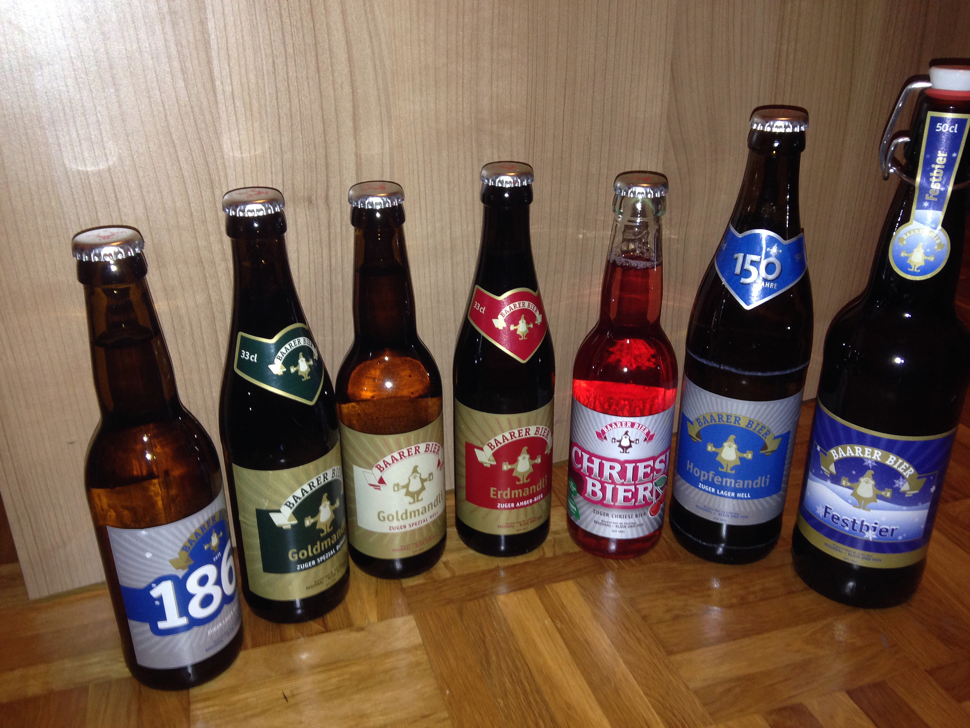 Verschiedene Biere der Brauerei Baar